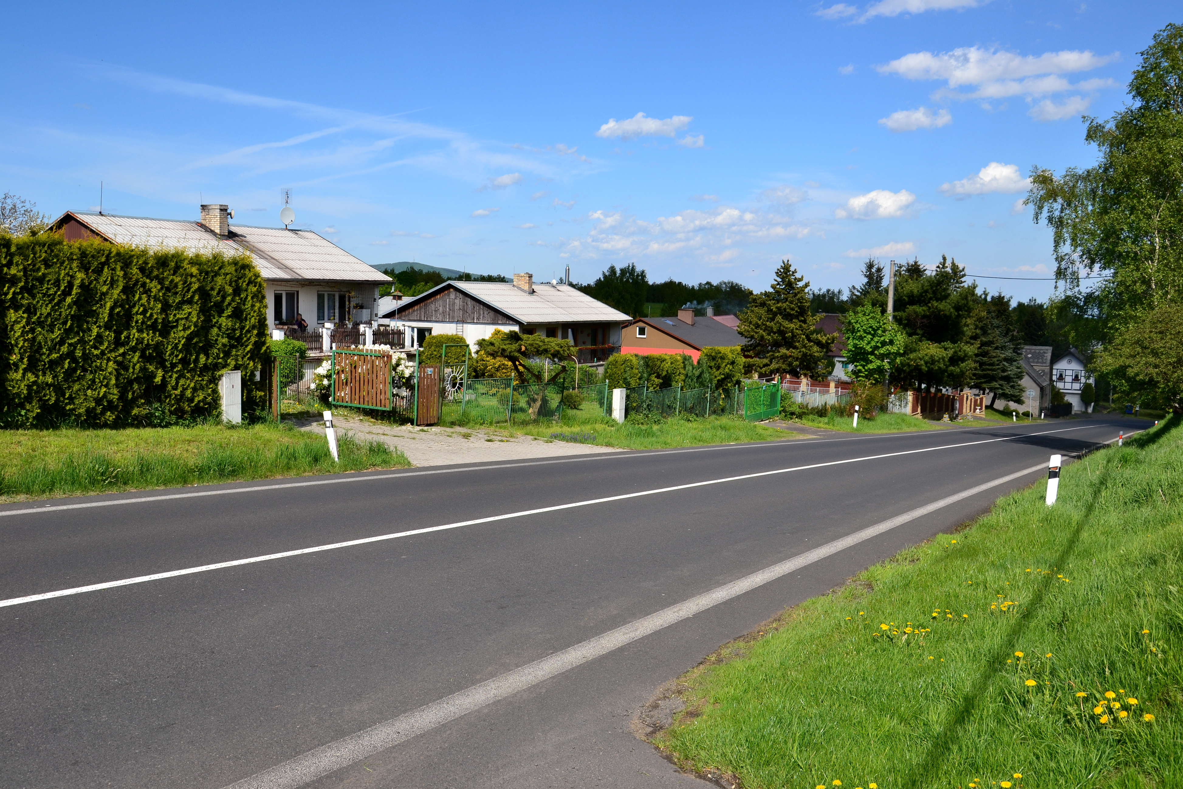 Mladší zástavba v horní části vesnice